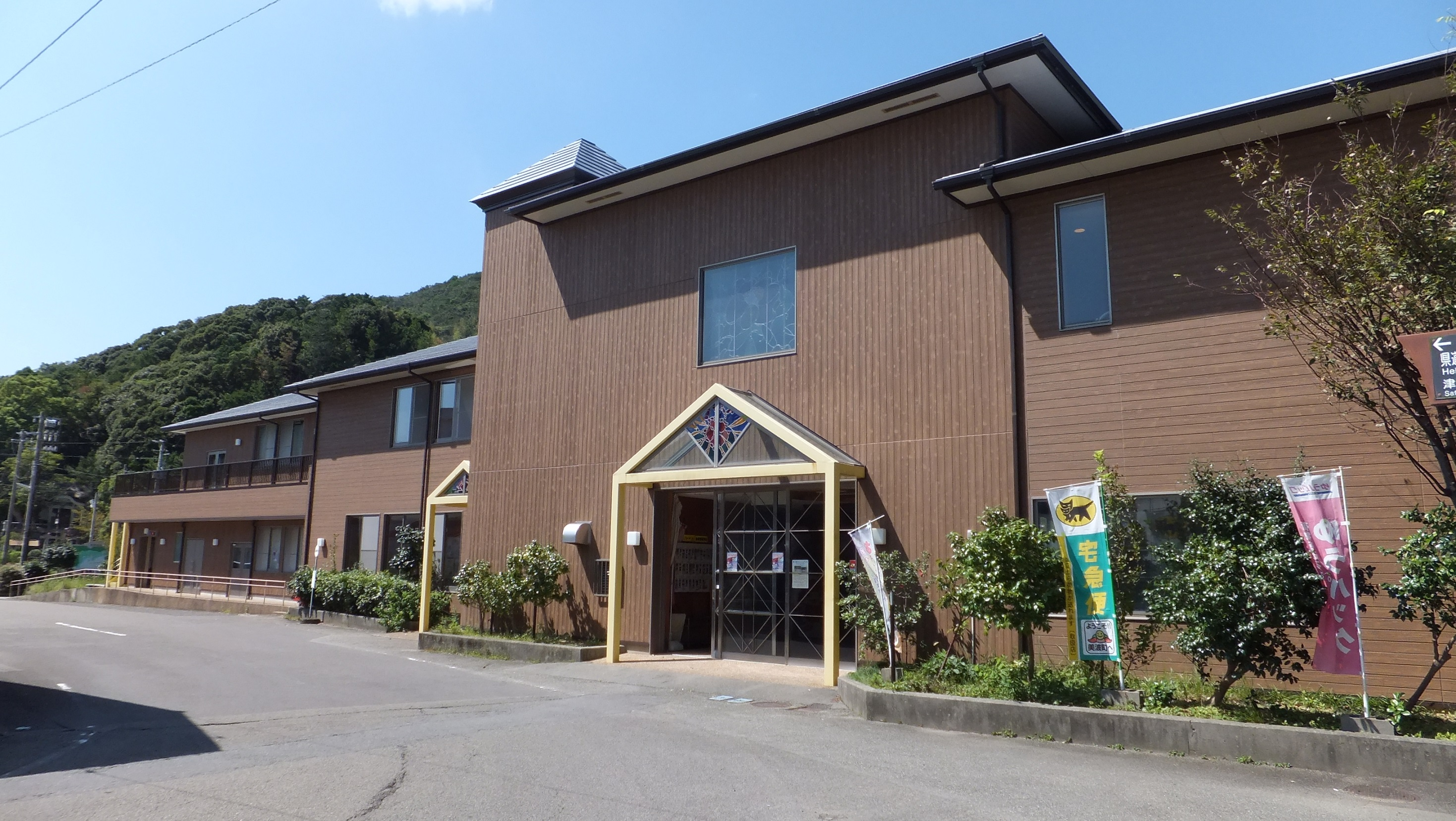 JR牟岐線 由岐駅 駅舎 （徳島県海部郡美波町 2015年）